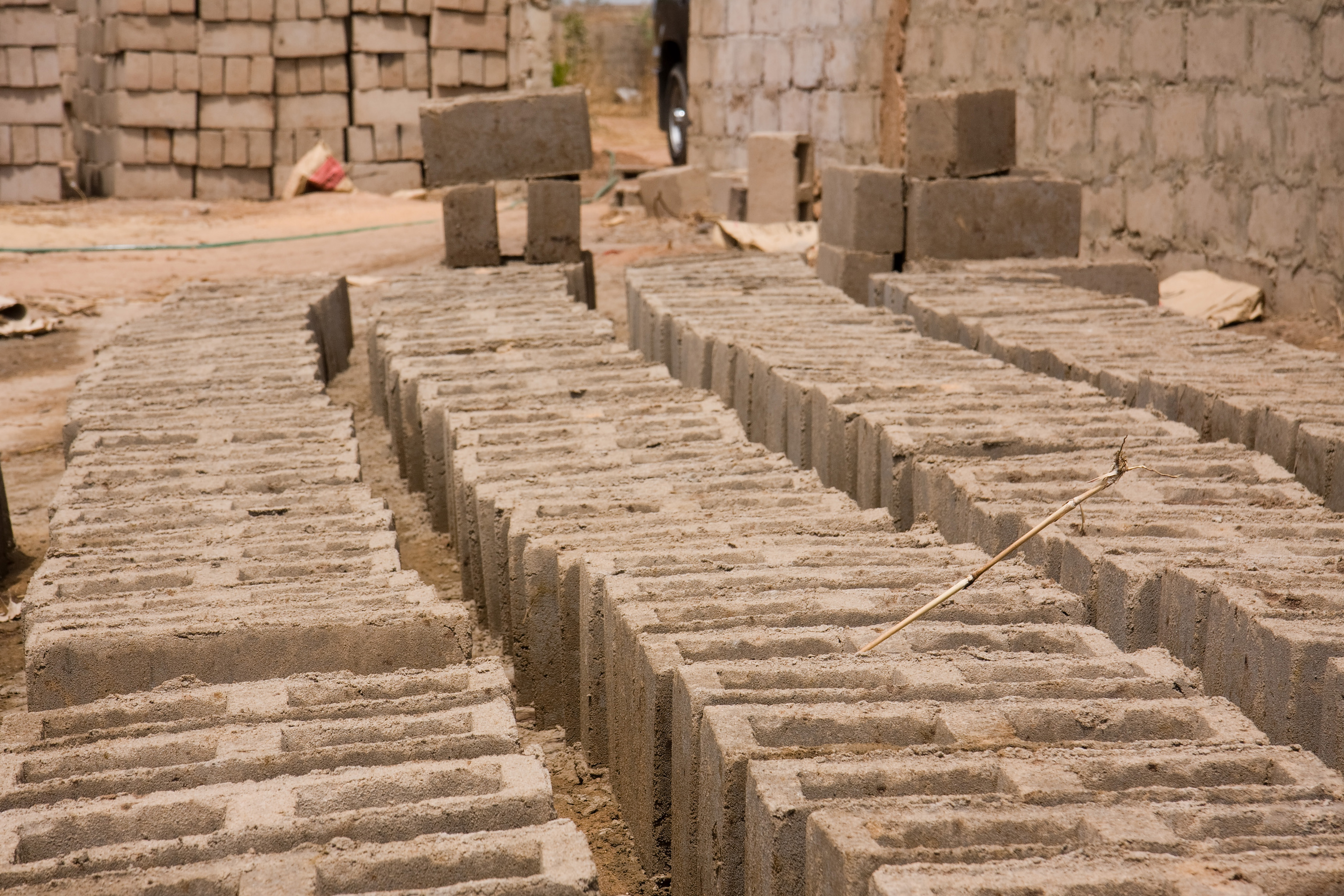 Mangels Backsteinfabrik werden in Gambia Mauersteine von Hand aus Mörtel erstellt. Der Zement bindet unter freiem Himmel ab.